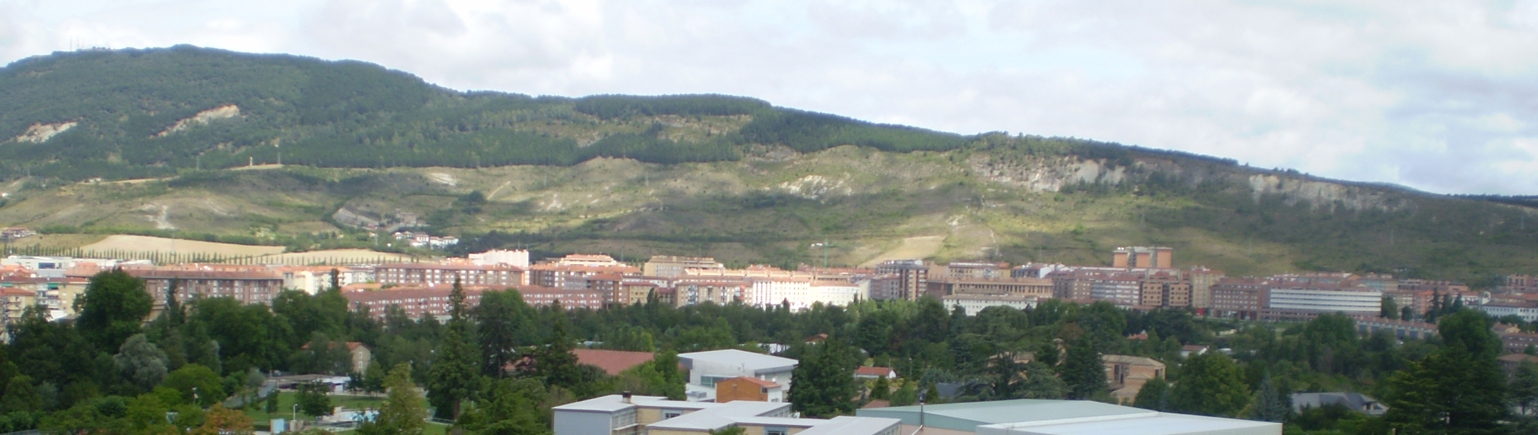 Panorámica de la Rochapea y el monte Ezcaba pSan Cristobal